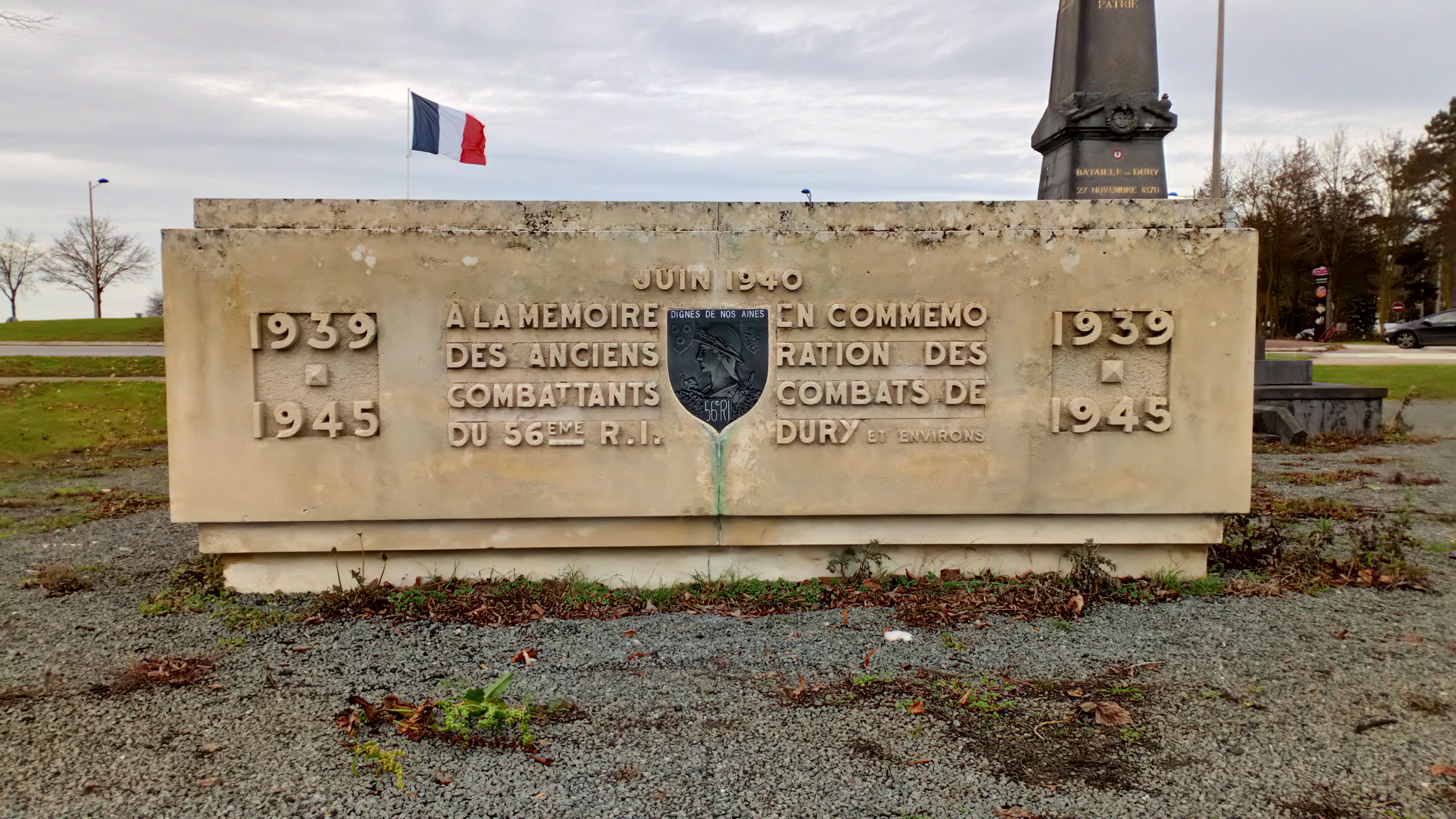 Stèle à la mémoire des anciens combattants du 56e régiment d'infanterie 1940 2